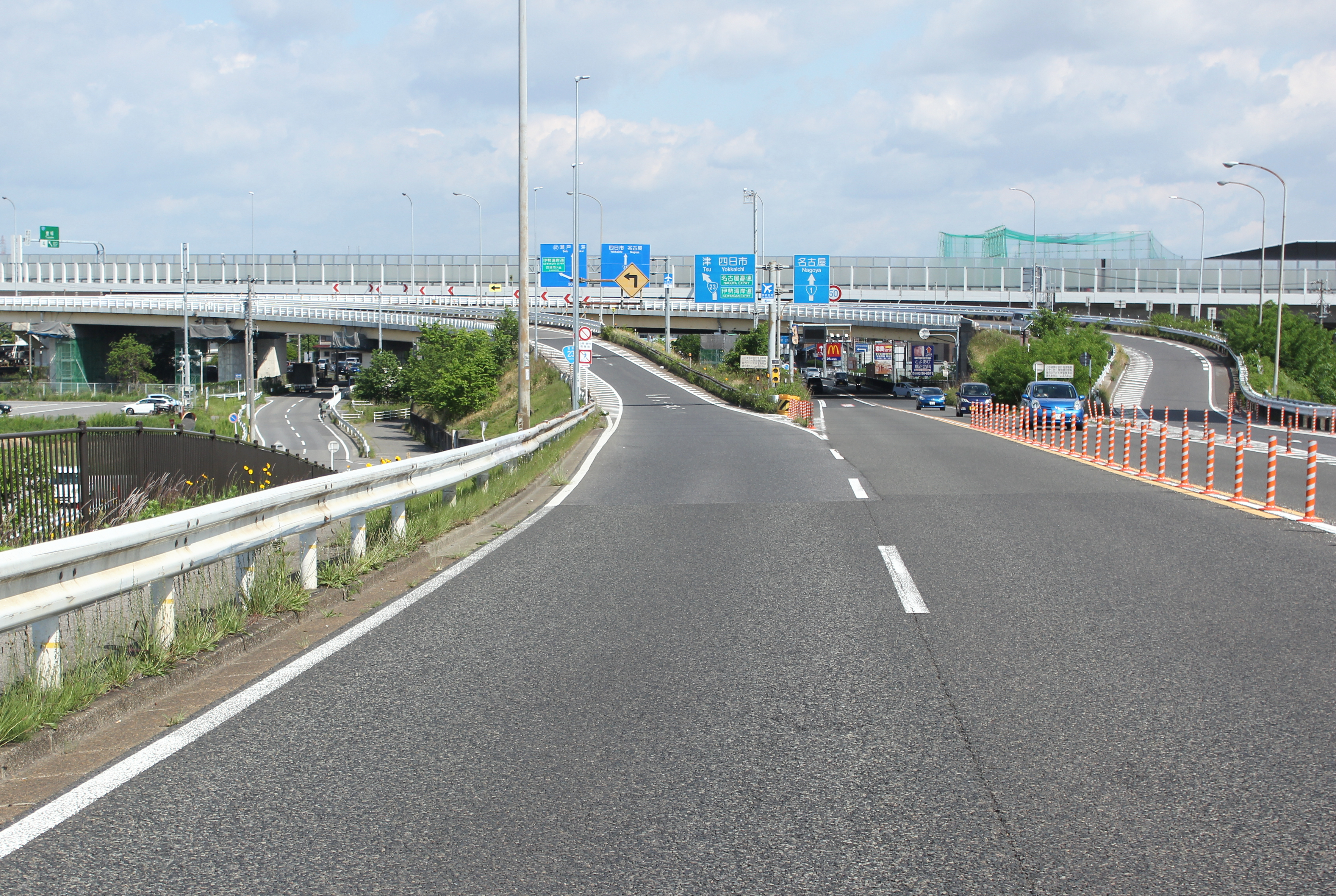 国道23号名四国道の起点（愛知県豊明市阿野町）